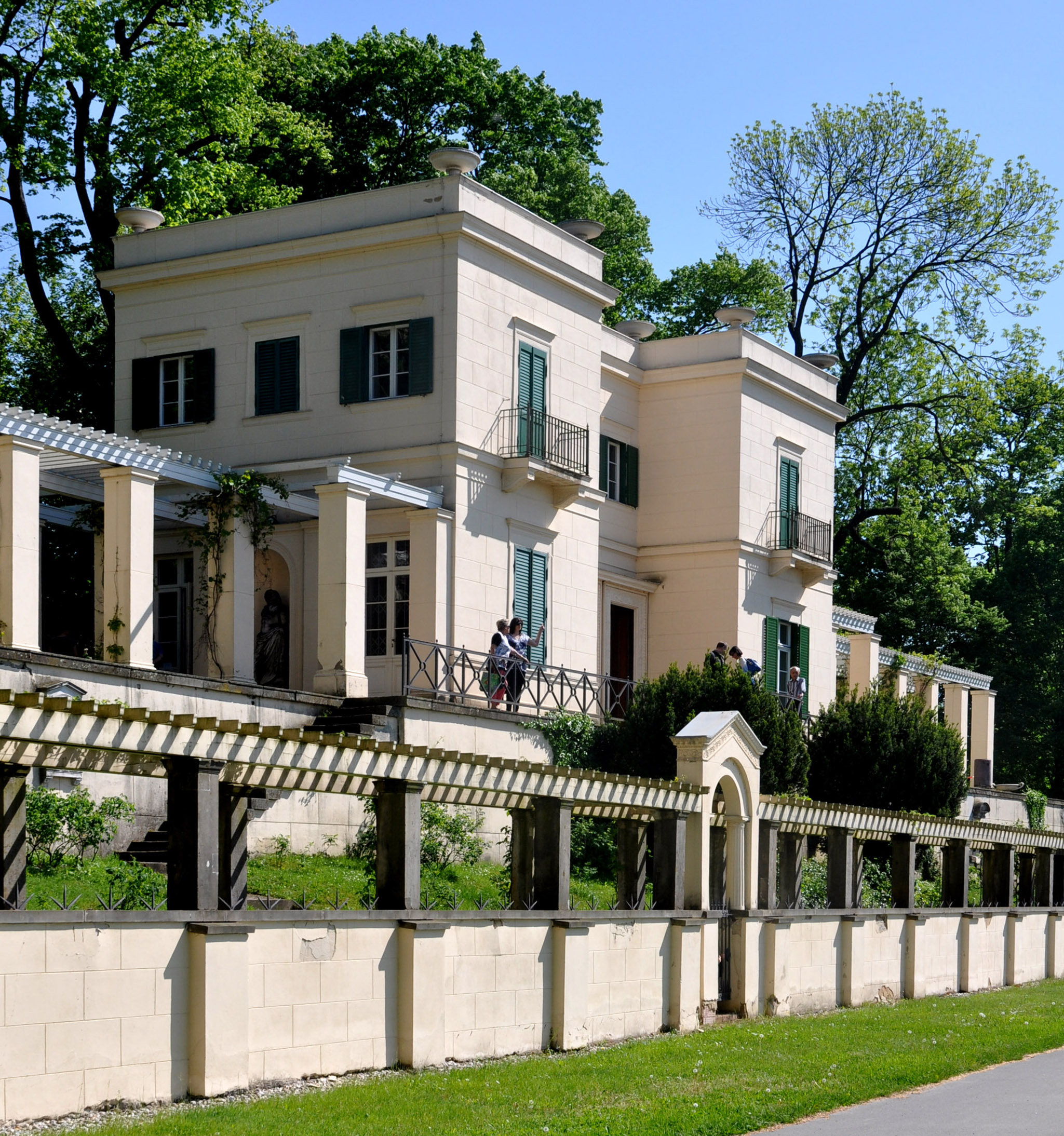 Das Casino in Glienicke von Nordwest